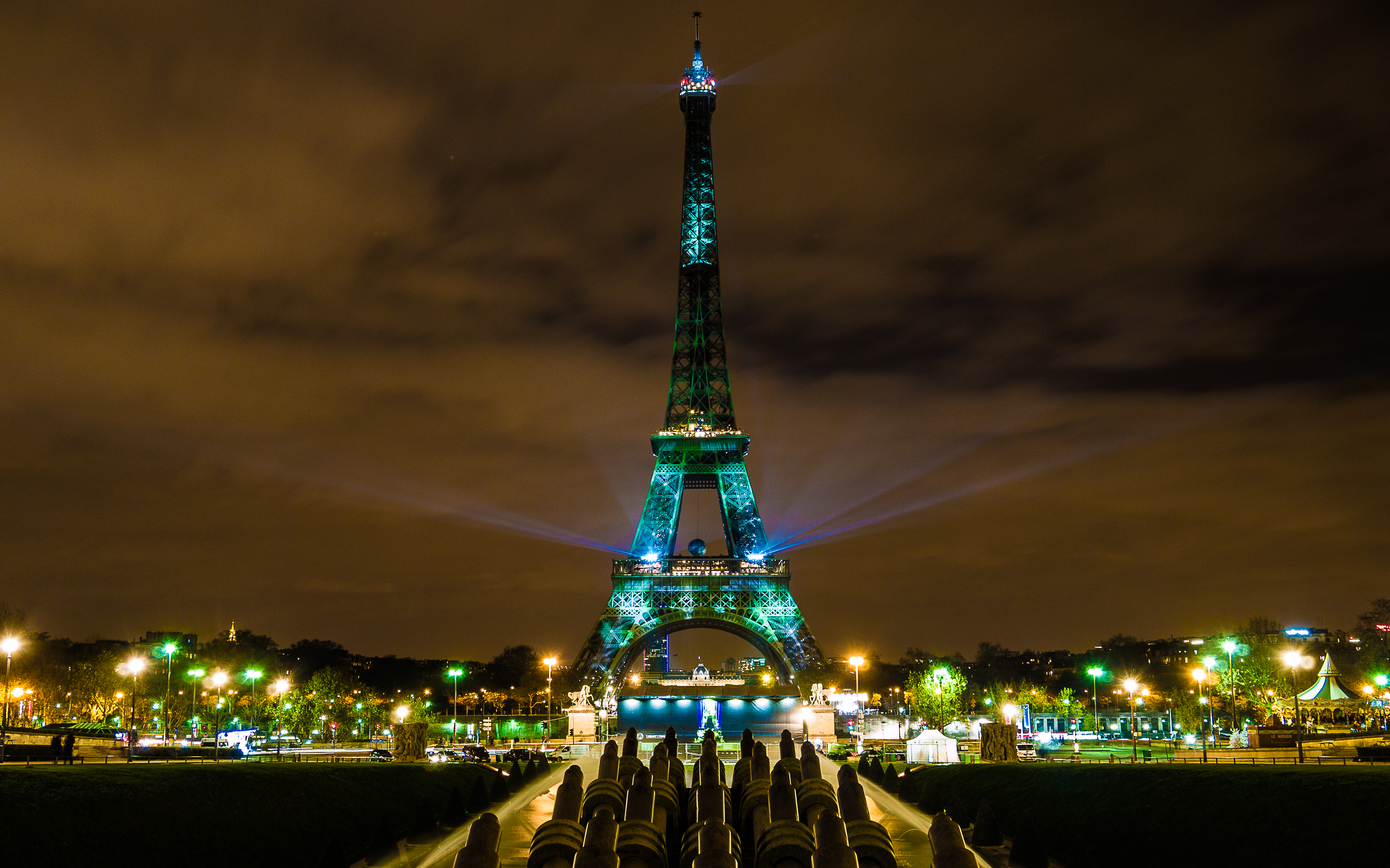 Oeuvre de Naziha Mestaoui